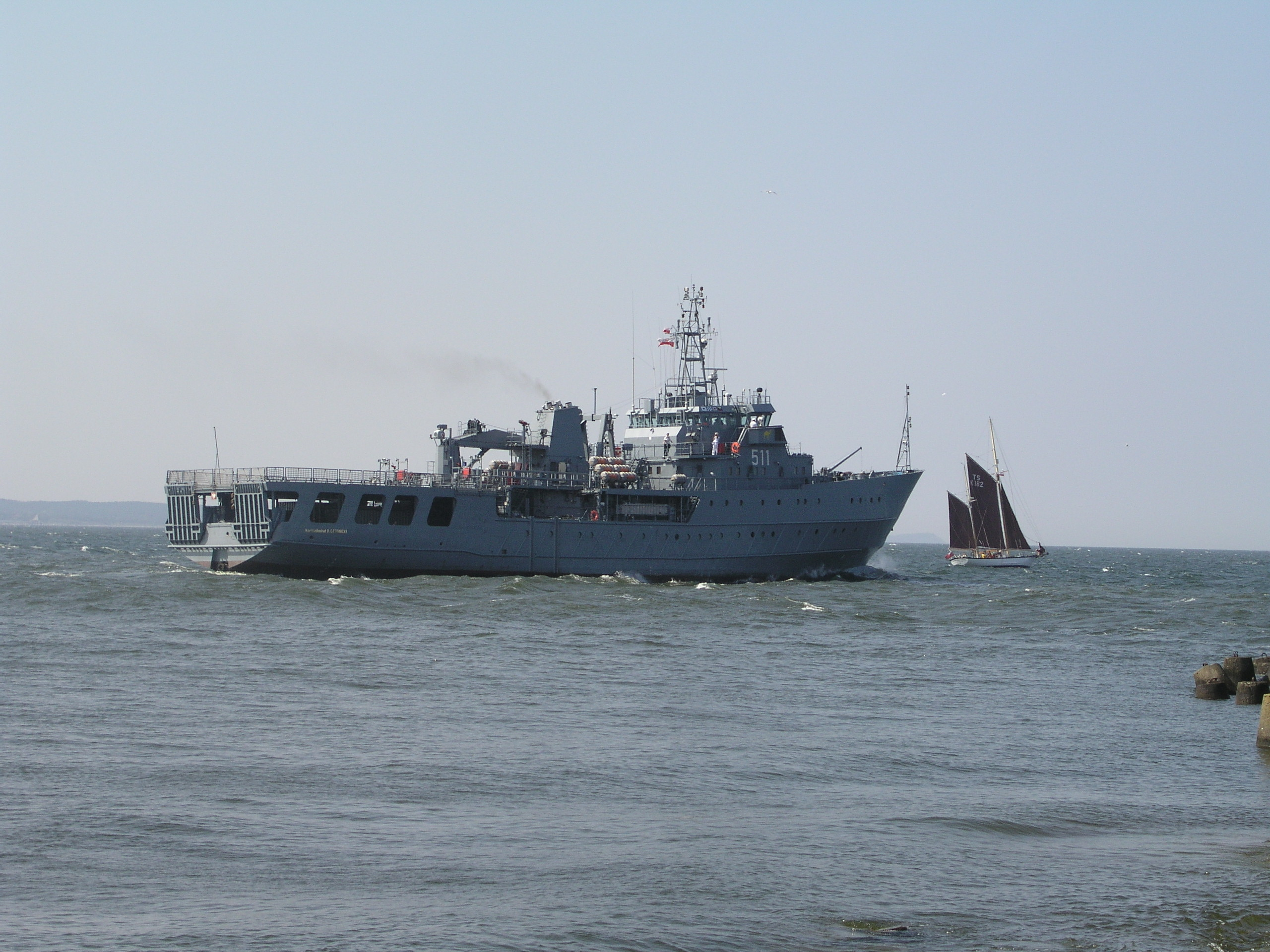 Polish Navy ship ORP Kontradmirał Xawery Czernicki near Świnoujście, Poland